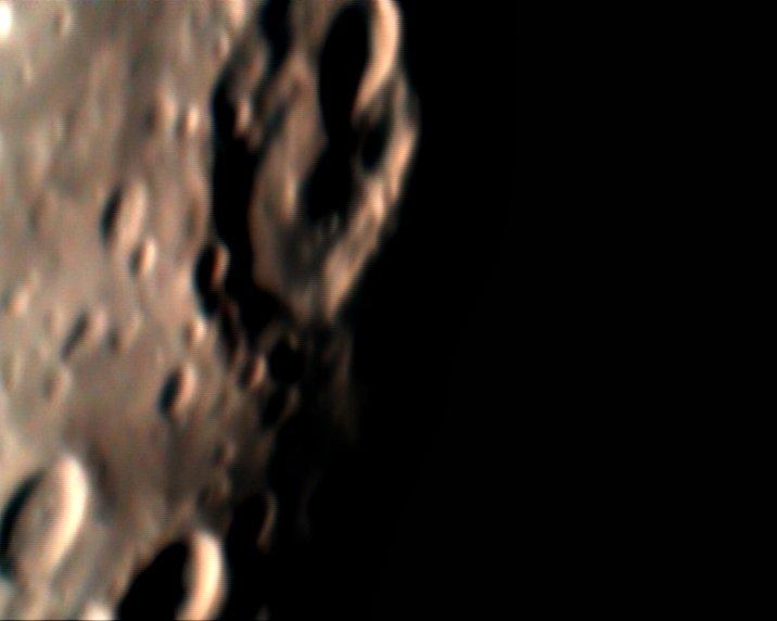 Cratere lunare Janssen visibile sul margine sudorientale del nostro satellite. L'immagine è stata ottenuta da un video realizzato con un MTO 1000 adattato e handycam in proiezione d'oculare con adattatore autocostruito.